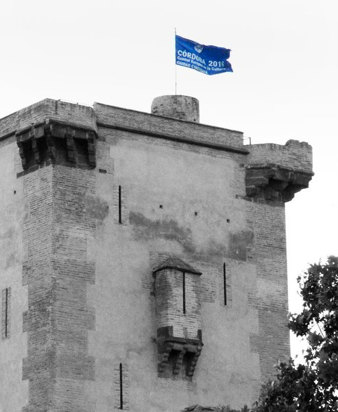 Vista de la Torre de Garci Méndez desde la Plaza de La Constitución, se observa una bandera azul, la cual fue izada con motivo de apoyo a la candidatura de Cordoba Capital Cultural 2016, cambiando así su bandera habitual por unos días, la la bandera del municipio.